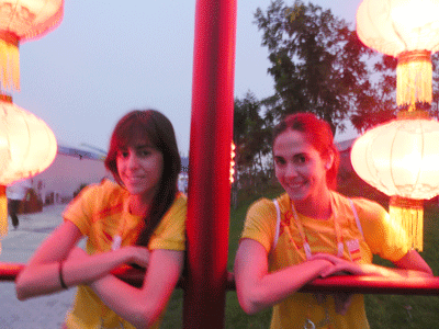 Las hermanas Lara y Bárbara González, del conjunto español de gimnasia rítmica, en los Juegos Olímpicos de Pekín 2008.